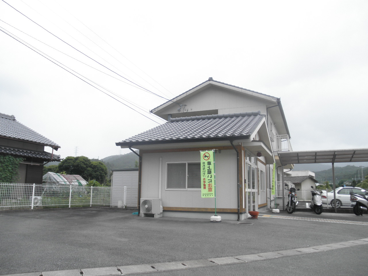 那賀警察署相生駐在所